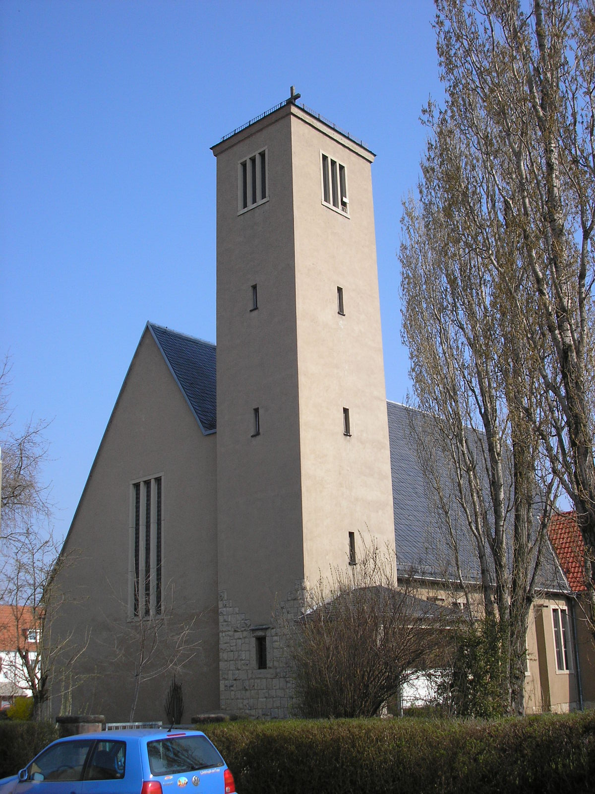 Die Antoniuskirche in Erfurt-Gispersleben (Thüringen).